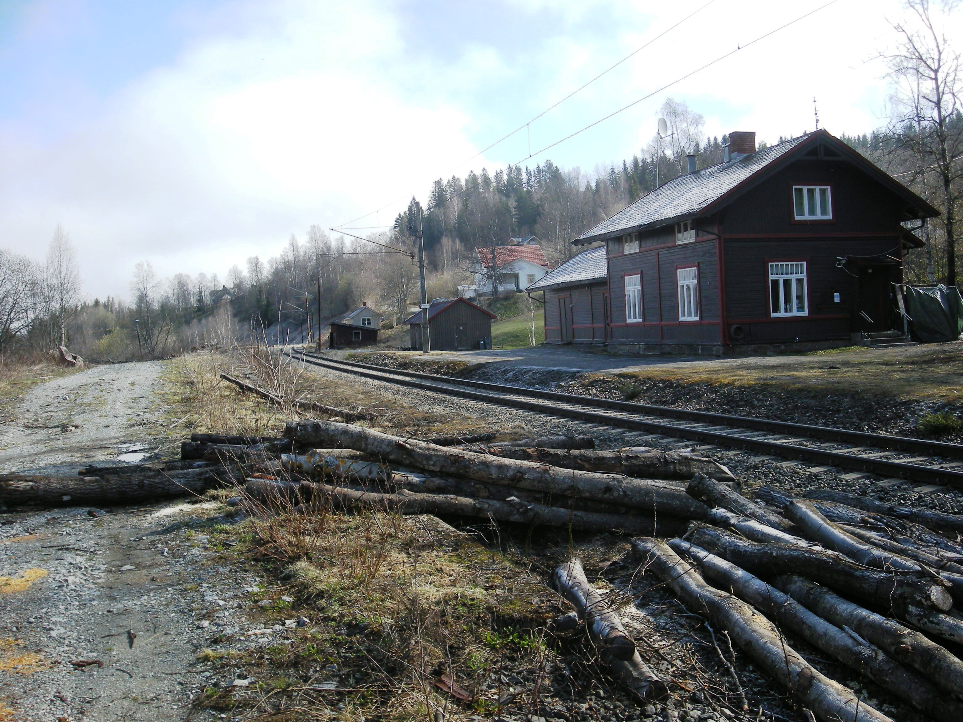 Breiskallen stasjon på Gjøvikbanen